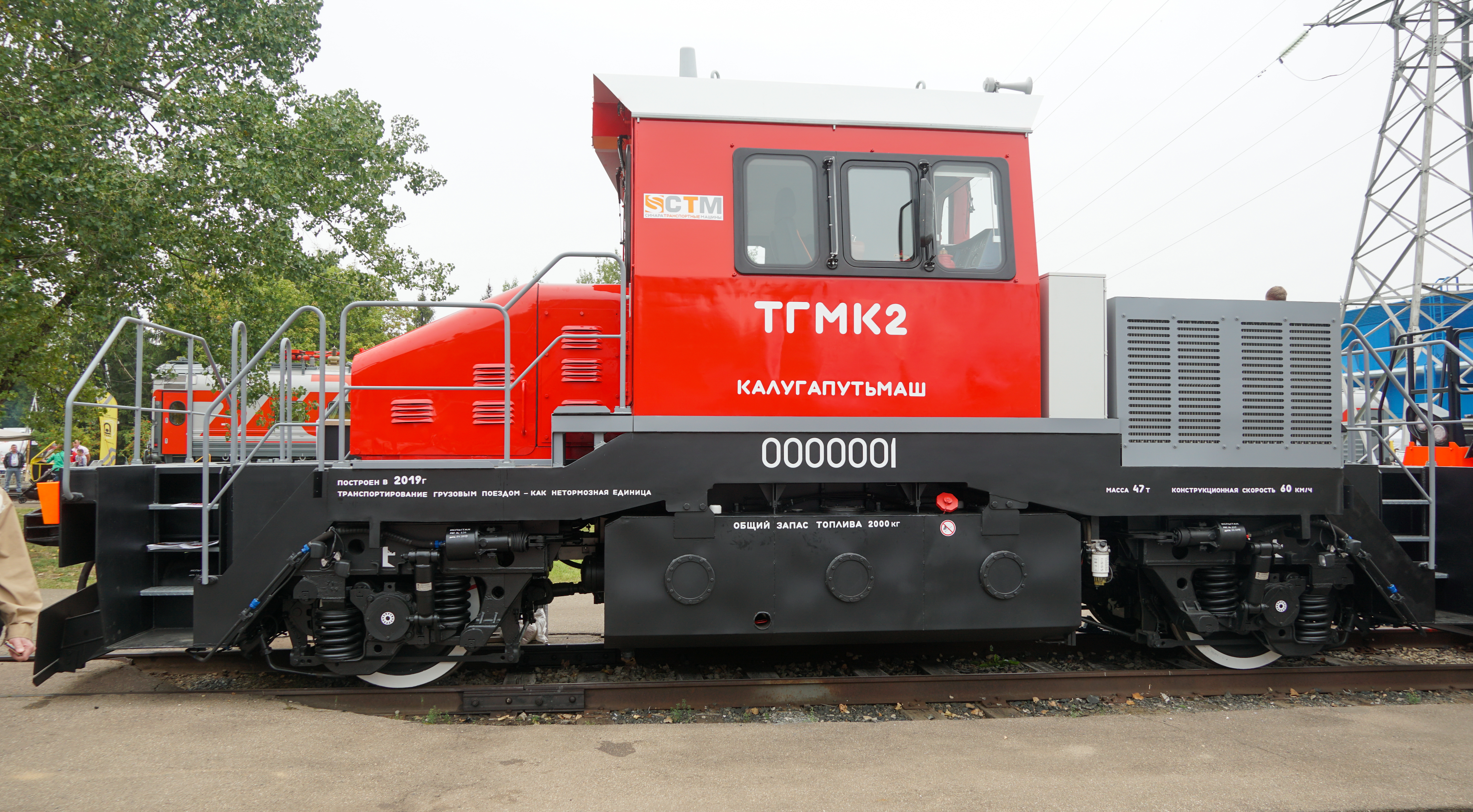 Тепловоз ТГМК2-0001 (вид сбоку) на территории депо кольца ВНИИЖТ в Щербинке на выставке ЭКСПО-1520 2019 года